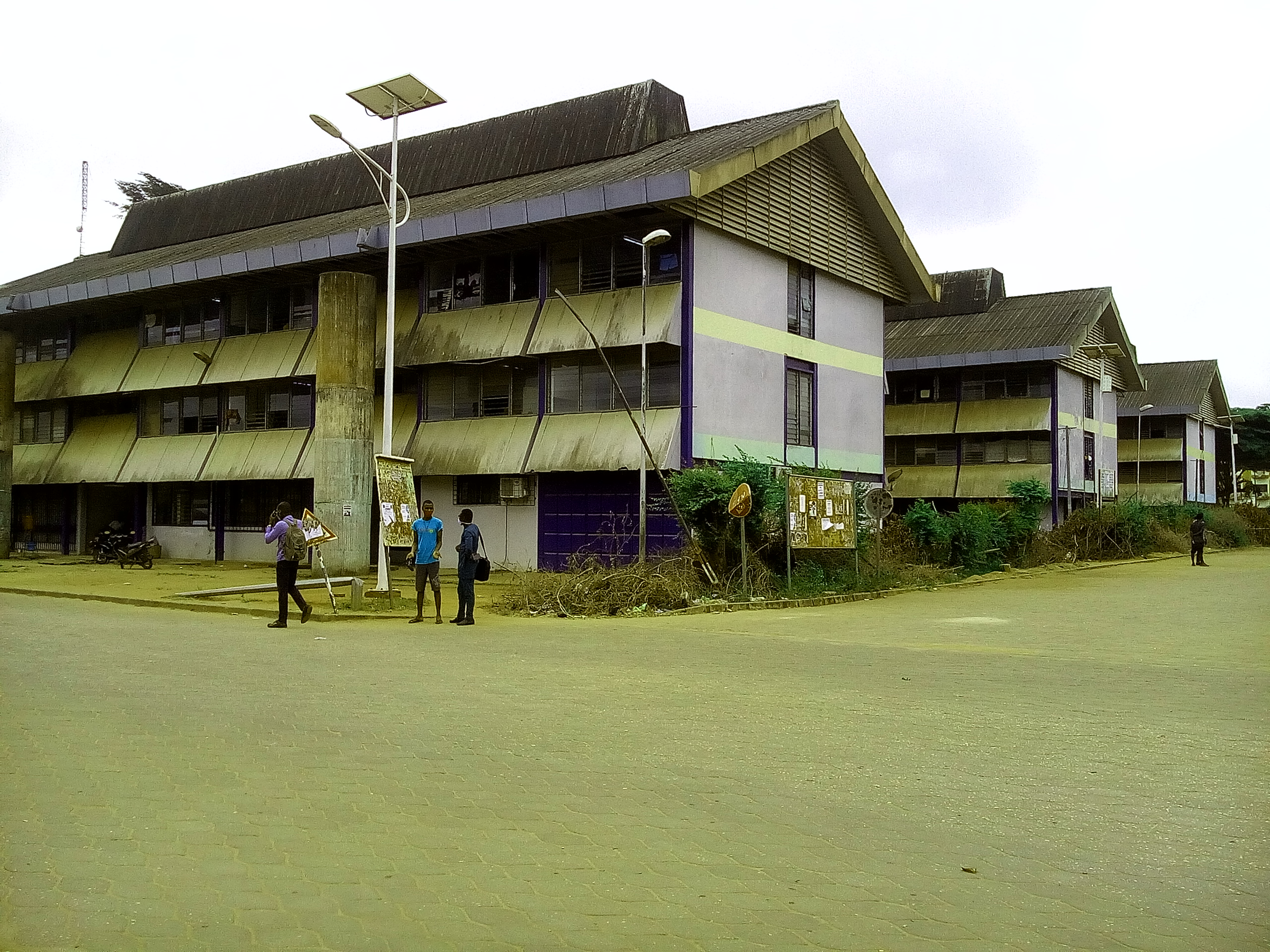 En face École polytechnique et à coté du terrain de basket.